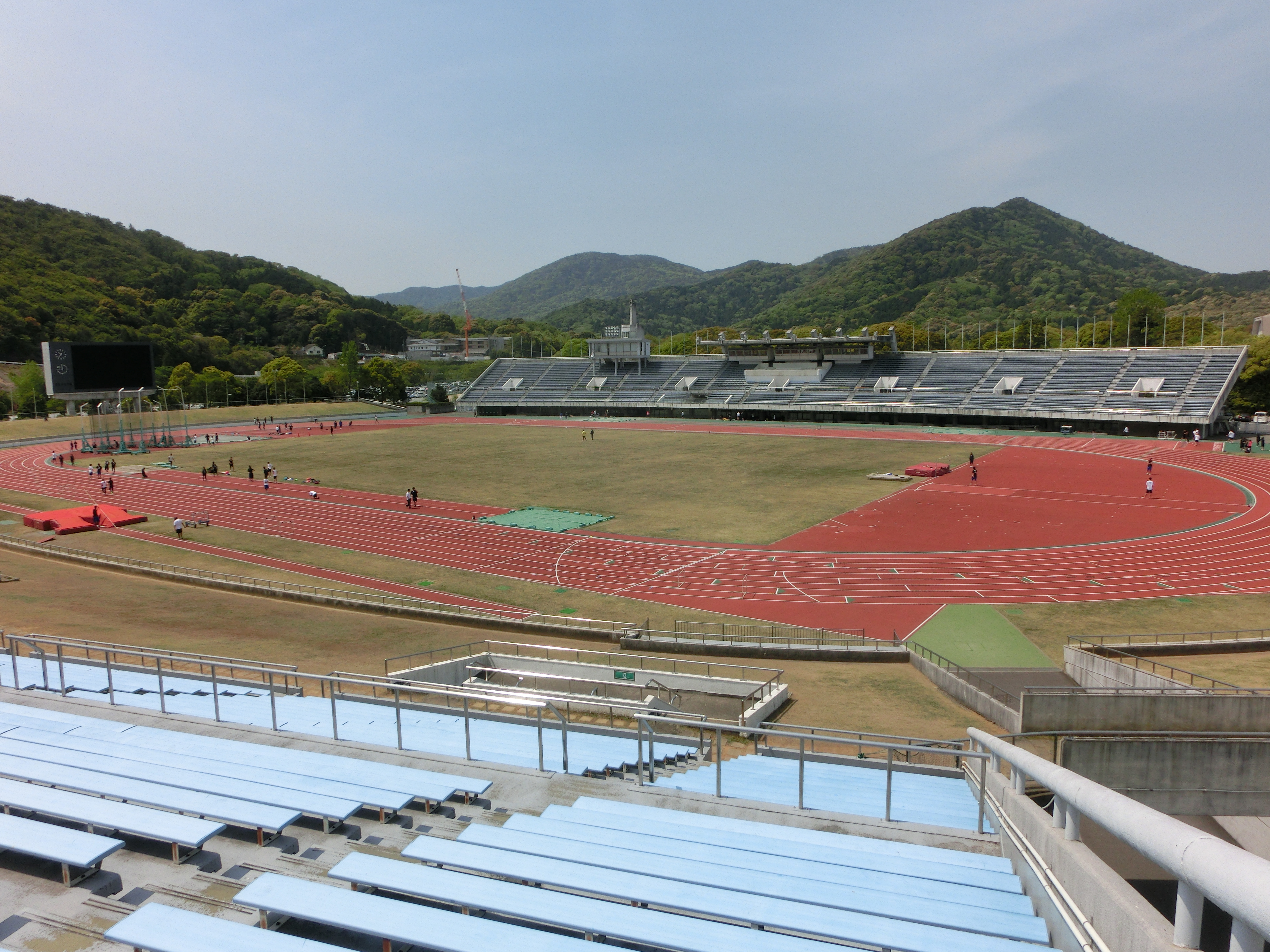 三重県営総合競技場